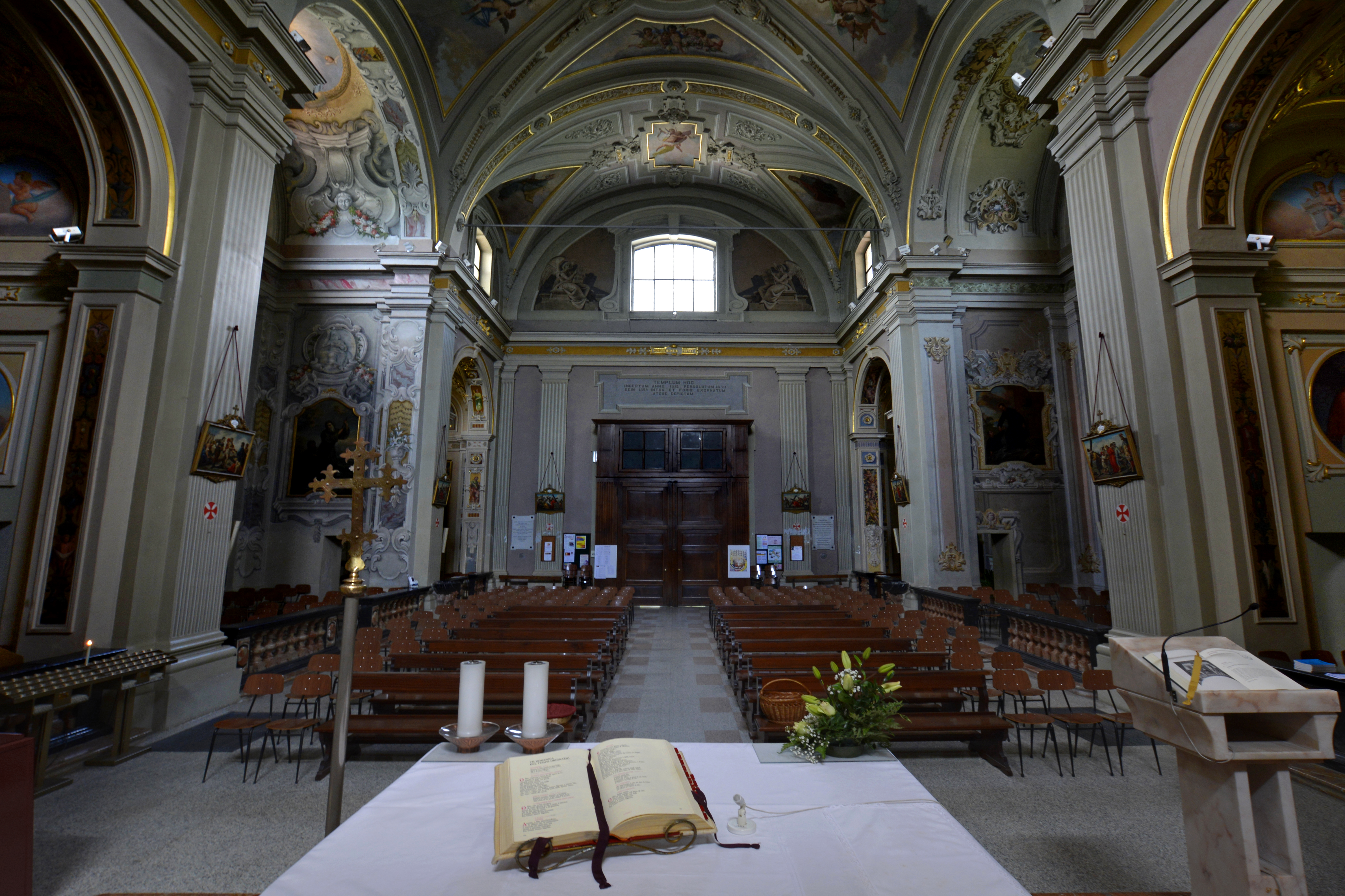 Q3895618 This is a photo of a monument which is part of cultural heritage of Italy.